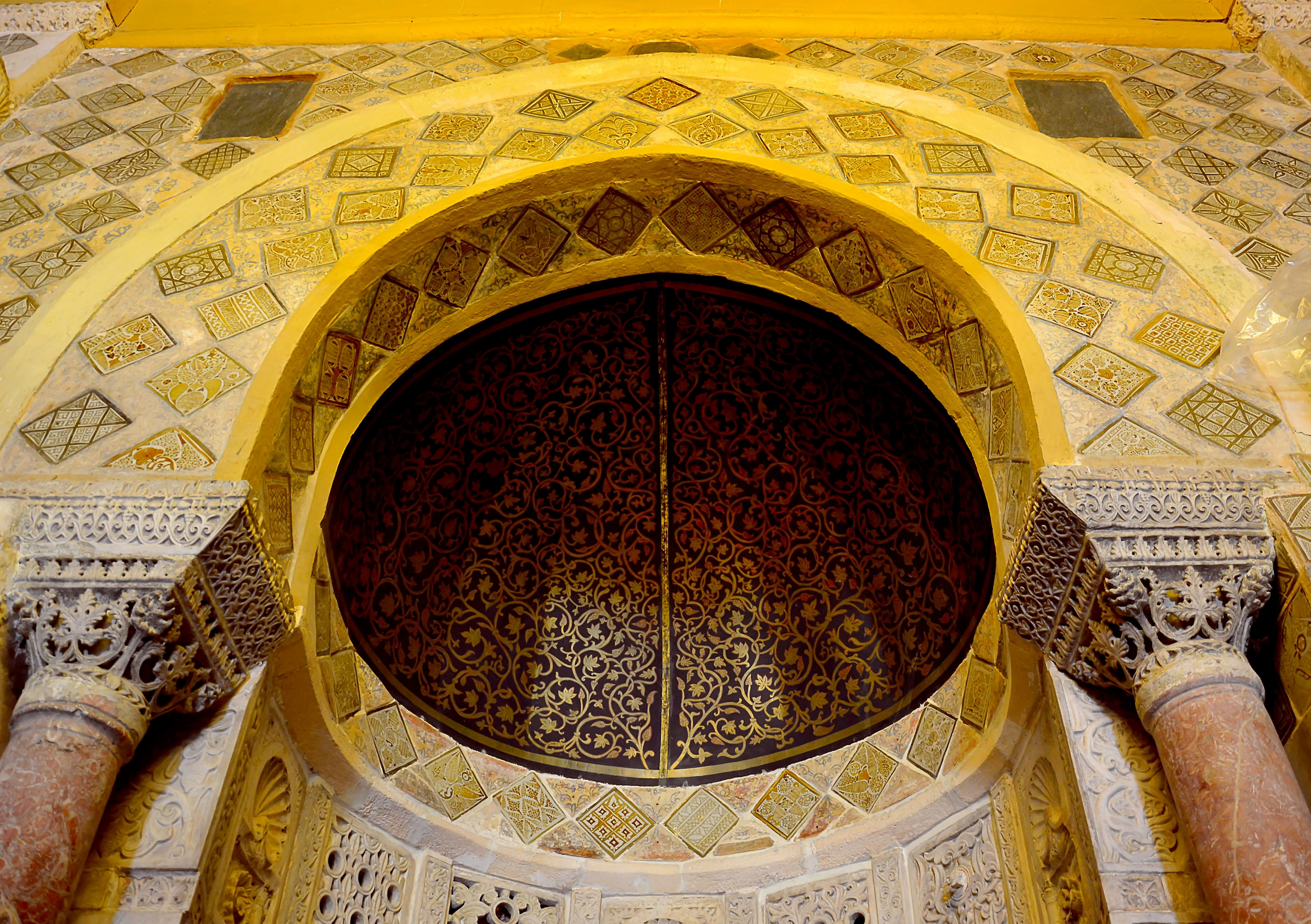 Grande Mosquée (Sidi Okba), détails du mihrab